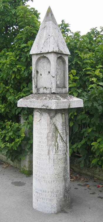 Znamenje opata Lovrenca iz leta 1583, zanimivost Ivančne Gorice